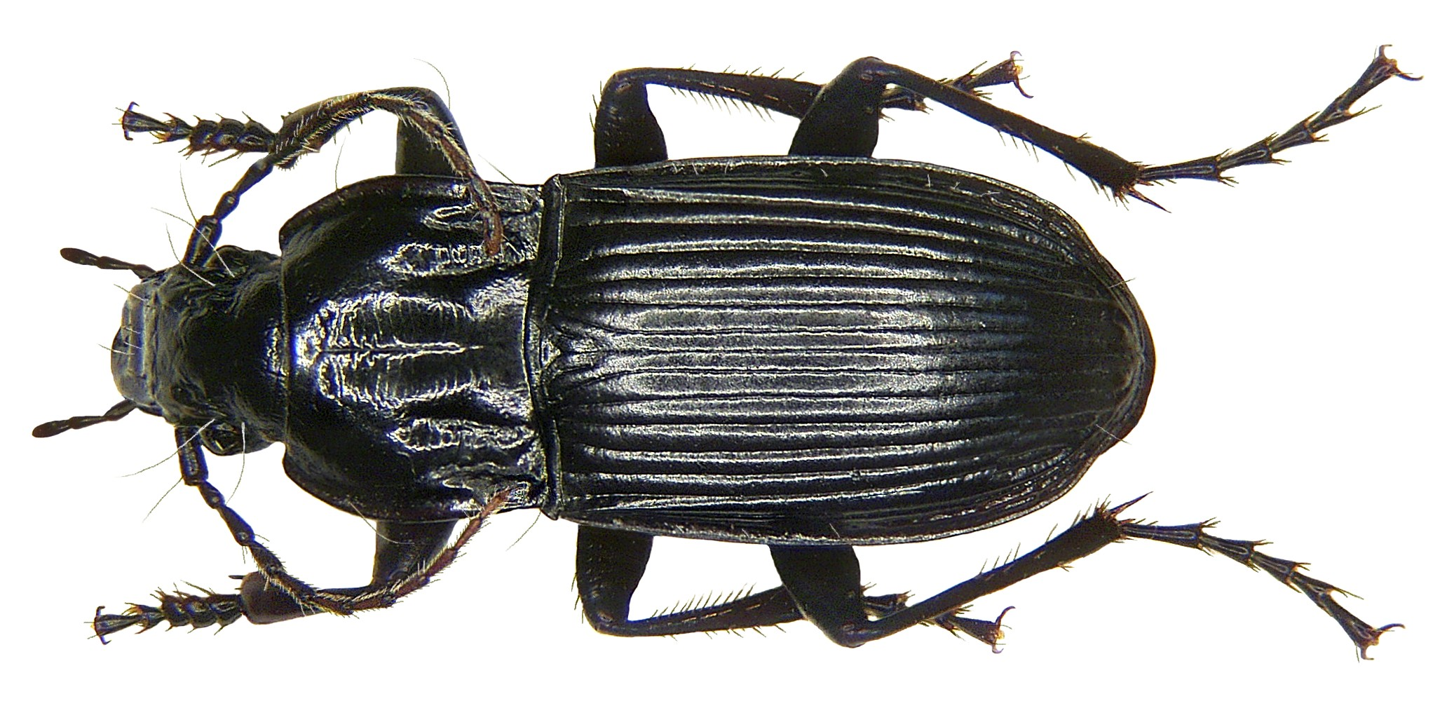 Familie: Carabidae Größe: 18-21 mm Verbreitung: Europa Ökologie: Waldbewohner Fundort: Germania, Fichtelgebirge, Seehaus leg. det. U.Schmidt, 1976 Foto: U.Schmidt, 2008